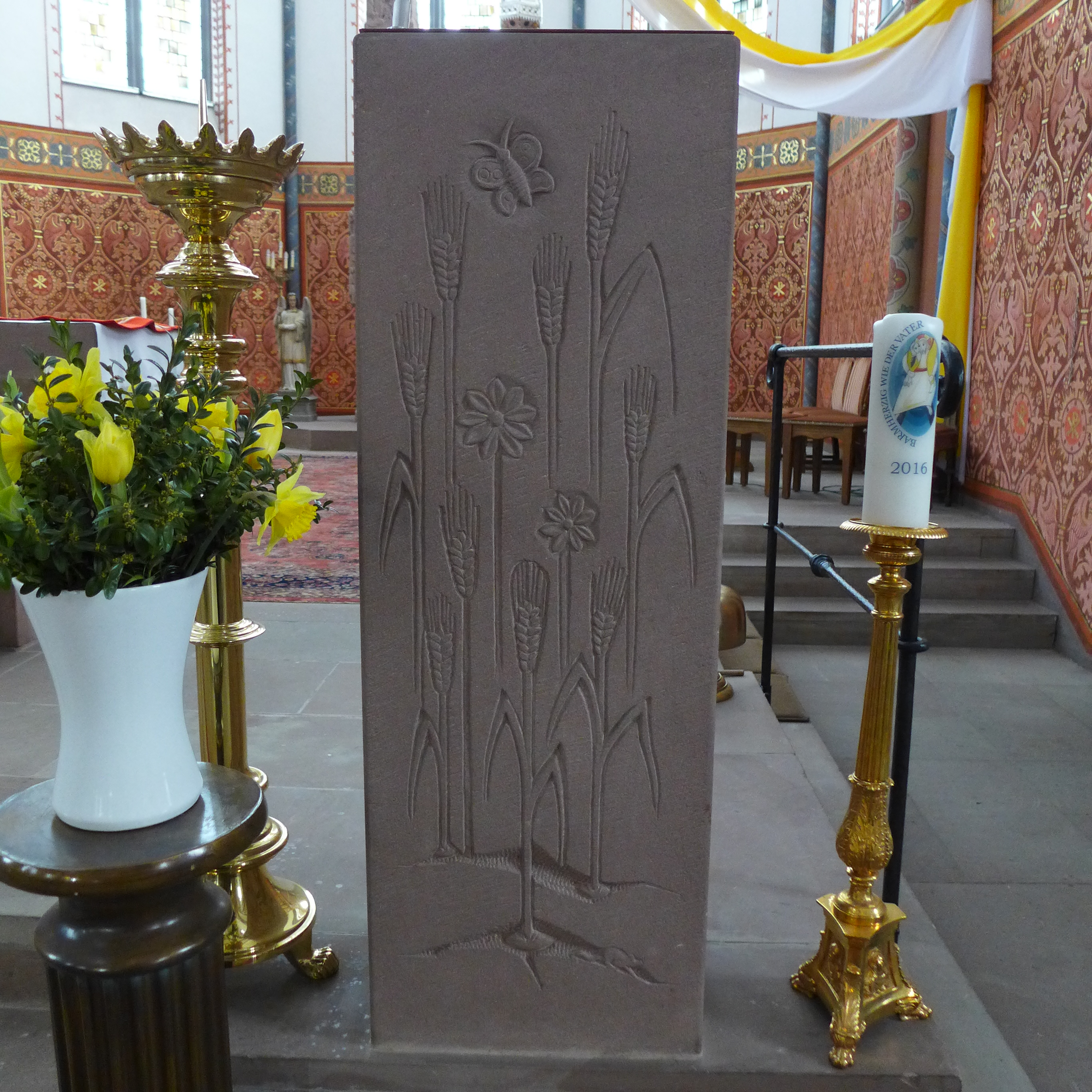 St. Katharina (Wallerfangen), Ambo